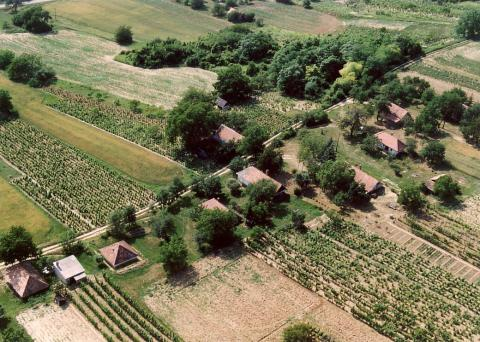 Pakod, Hungary, aerialphotography